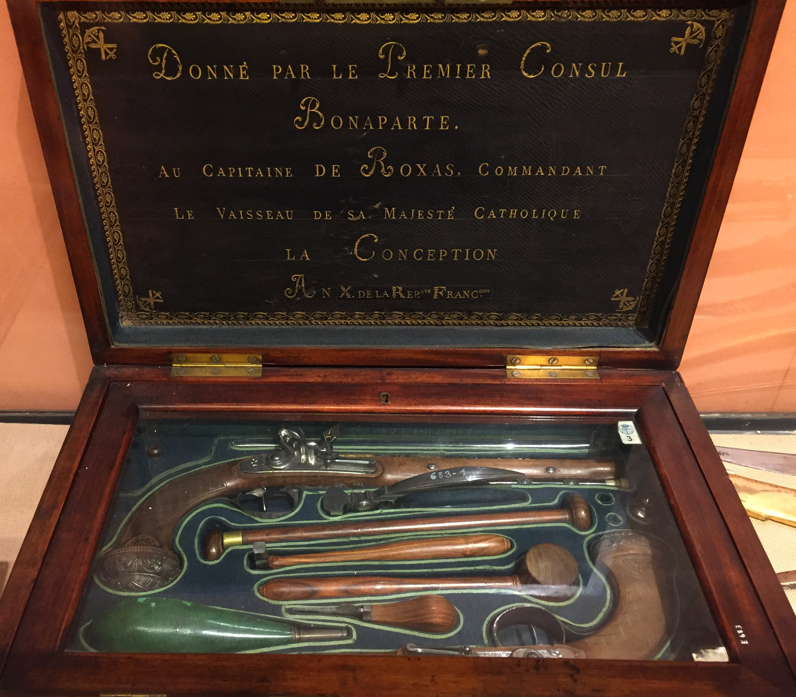 Pistolas regaladas en 1802 (año X de la República Francesa) por Napoleón Bonaparte, Primer Consul, al capitán de navío español José María de Rojas Arrese, comandante del navío Concepción durante su estancia en Brest entre 1799 y 1802. Fabricadas en Versalles (Francia) por el armero real Nicolas Boutet. Museo Naval de Madrid